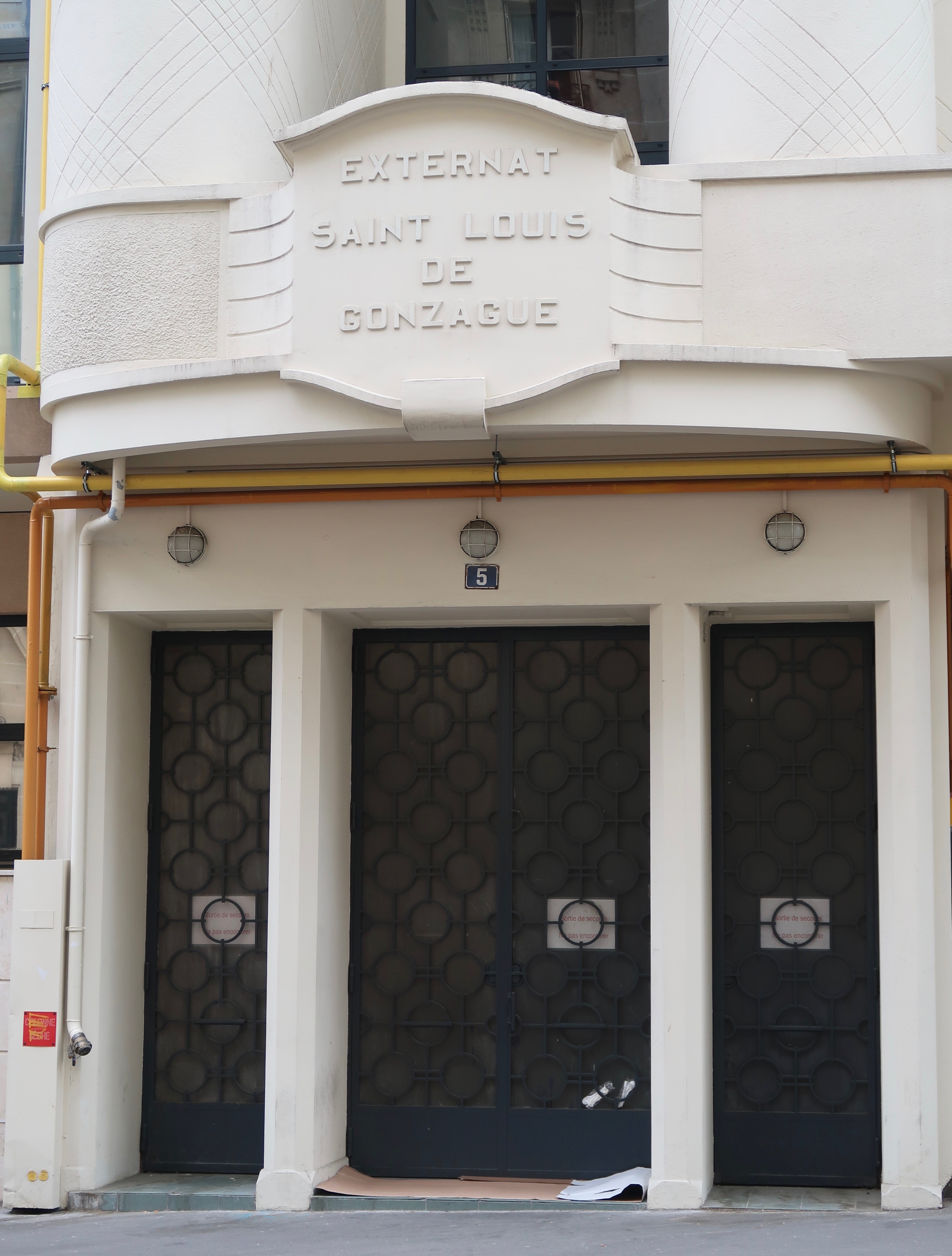 Collège-lycée Franklin Saint-Louis de Gonzague, 5 avenue de Camoens (Paris, 16e).